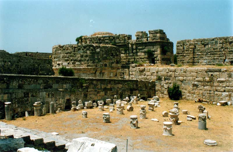 Крепость иоаннитов, о.Кос (Греция)